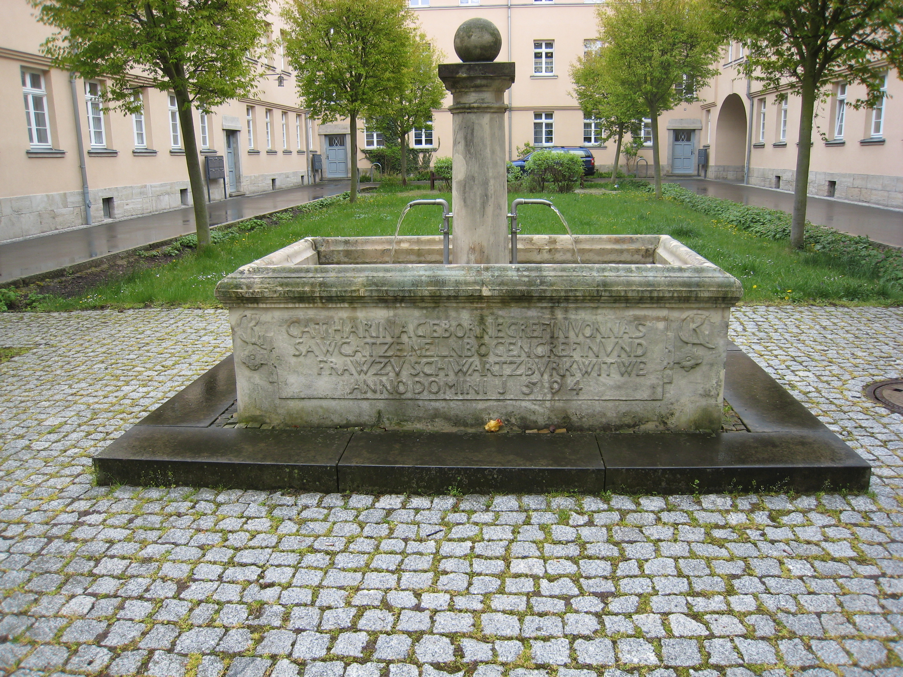 Historischer Brunnen im Fasanengarten in Arnstadt, vormals im Garten des Prinzenhofes.